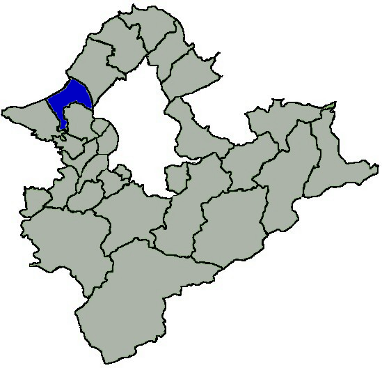 KaurJmeb為編寫中華民國臺灣省臺北縣八里鄉，於2005年2月6日所繪。